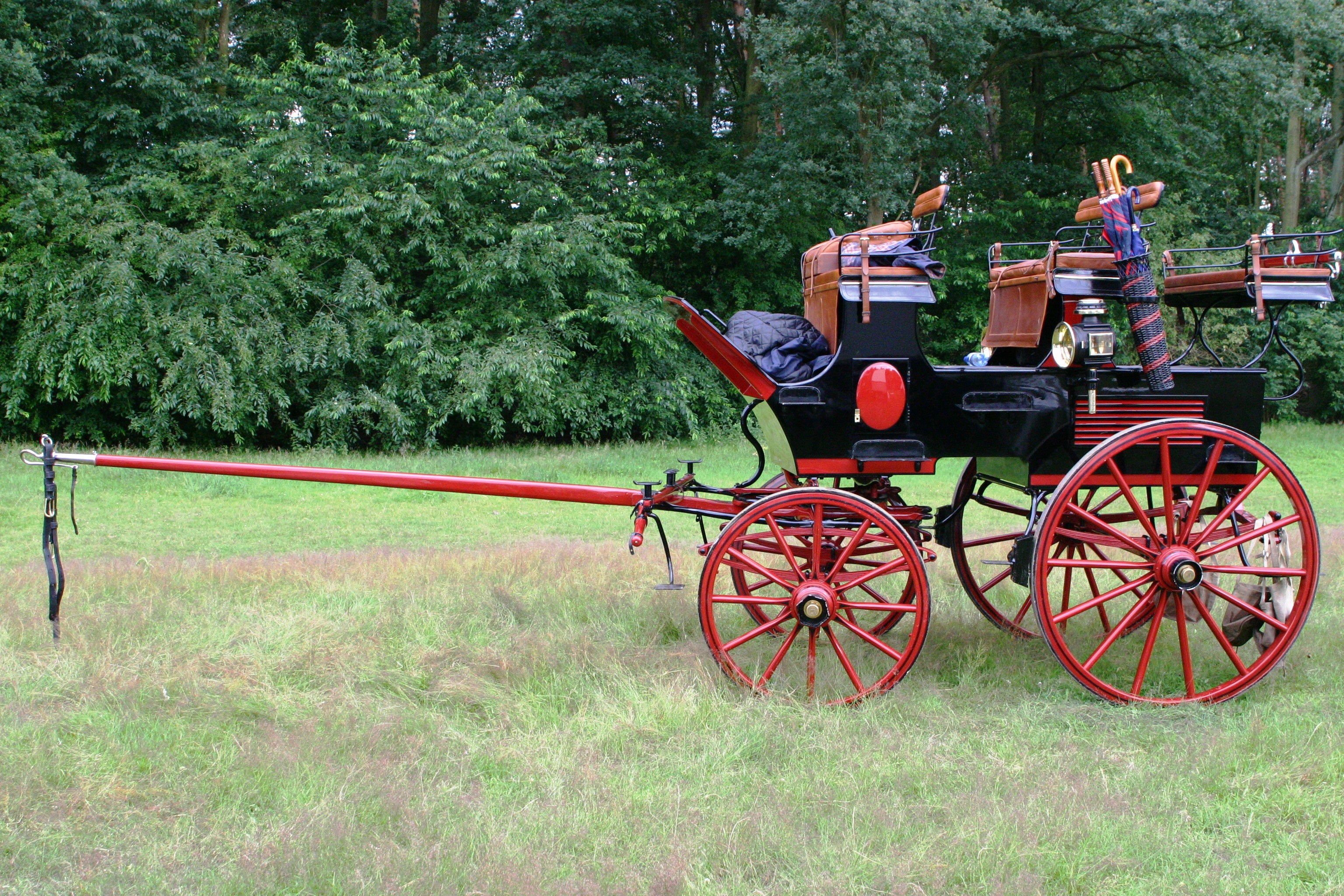 Roof Seat Break.